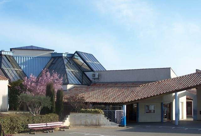 Collège Brassens Narbonne